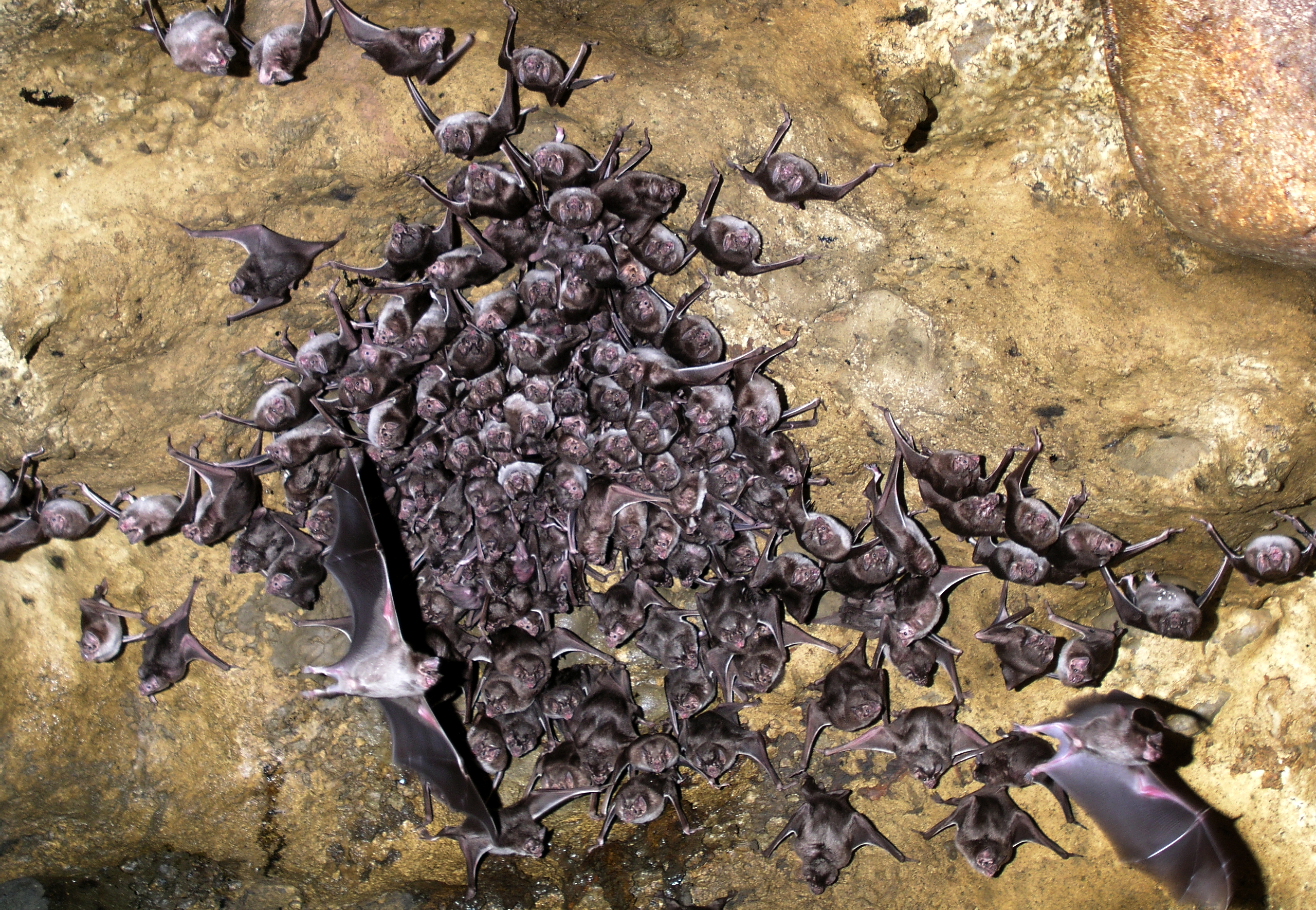 Vampiros en la cueva del Rio Shatuca (Yambrasbamba, Bongara, Amazonas, Peru)